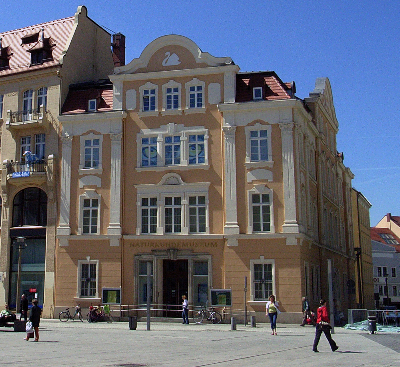 Dieses Bild zeigt das Naturkundemuseum in Görlitz.